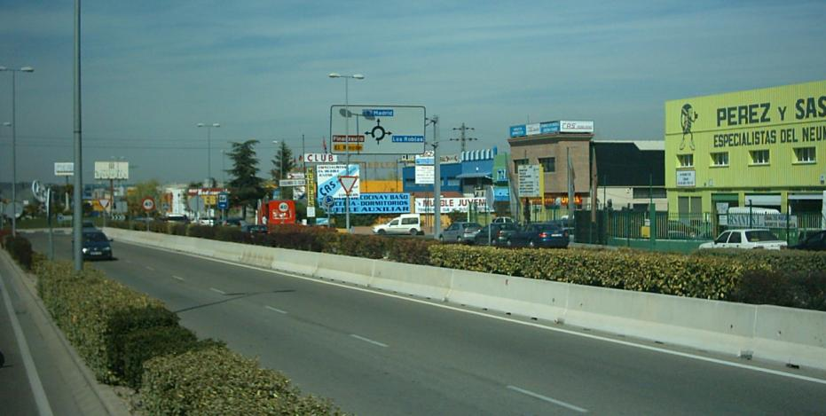 Poligono Industrial de Arganda